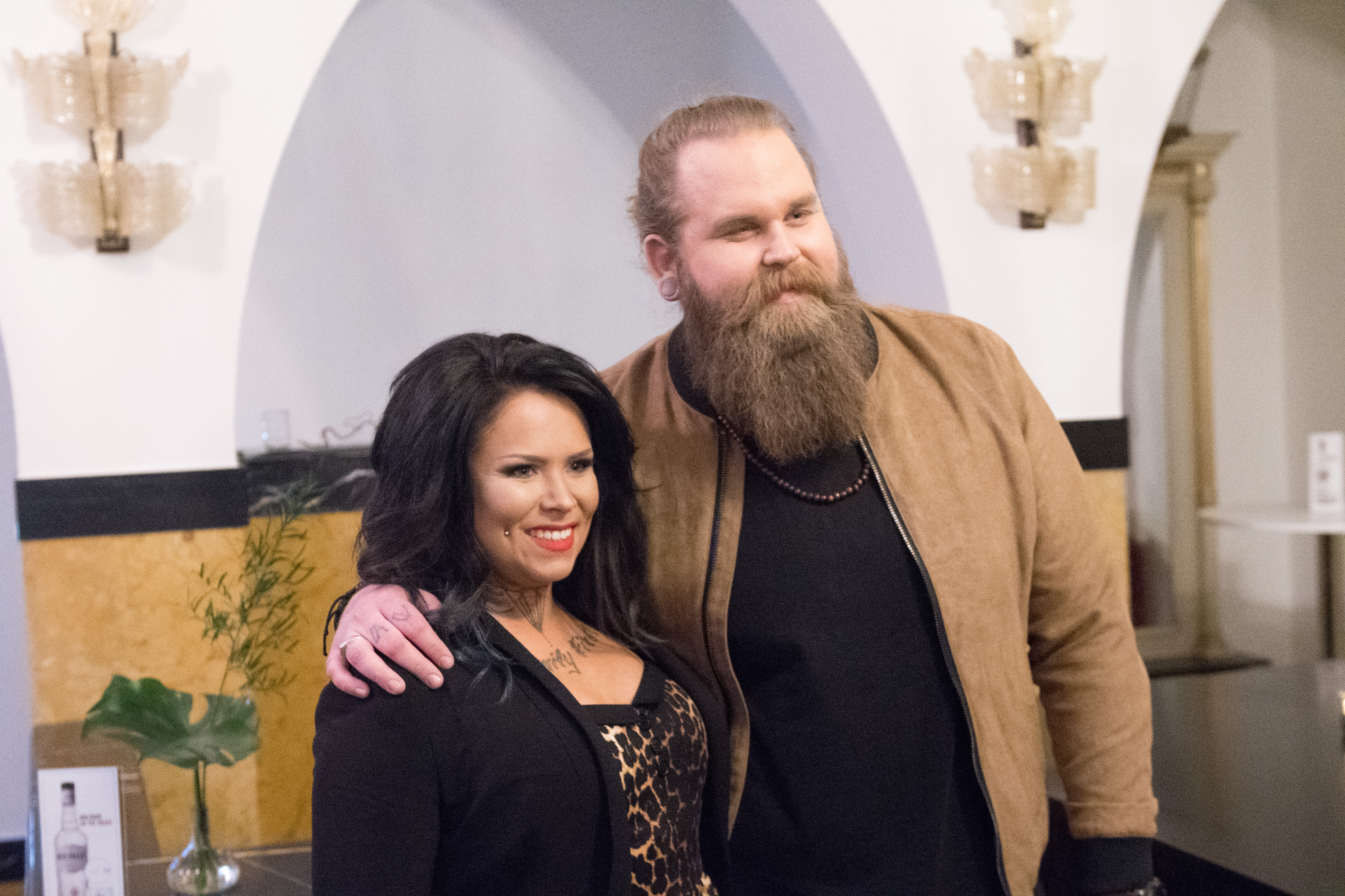 Chris Kläfford anländer till efterfesten i Malmö.